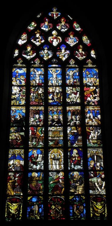 Maîtresse-vitre de l'église Saint-Éloi d'Iffendic (35).